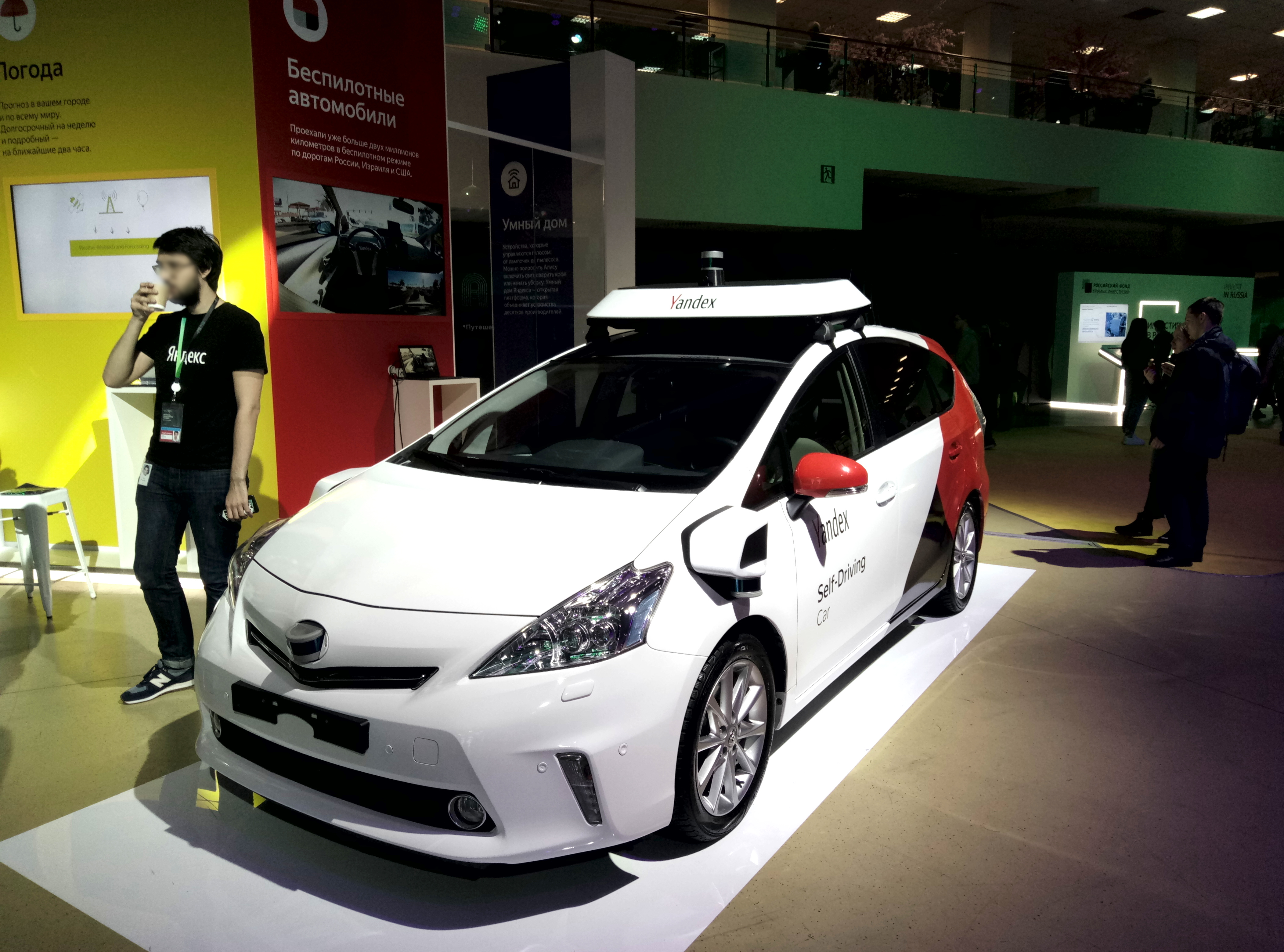 Беспилотный автомобиль Яндекса представленный на конференции Artificial Intelligence Journey, Москва, ноябрь 2019 года